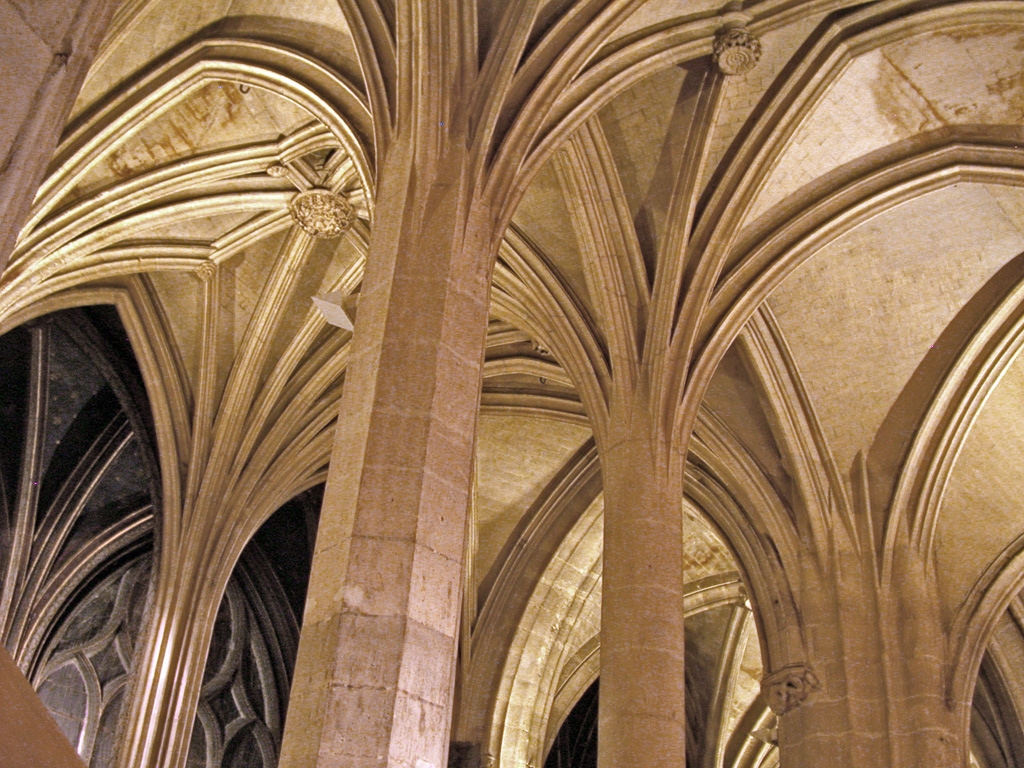 Francia, Parigi, chiesa di Saint Séverin, deambulatorio, pilastri e volta